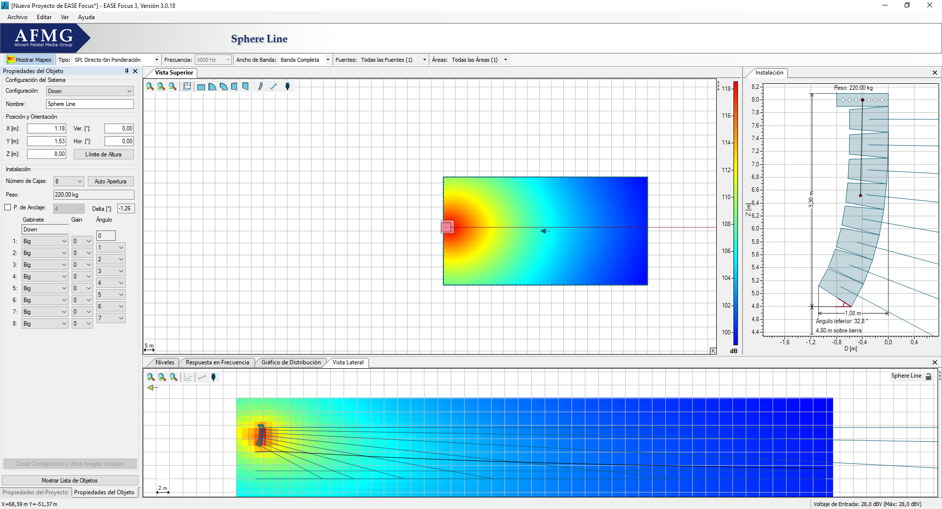 EASE Focus